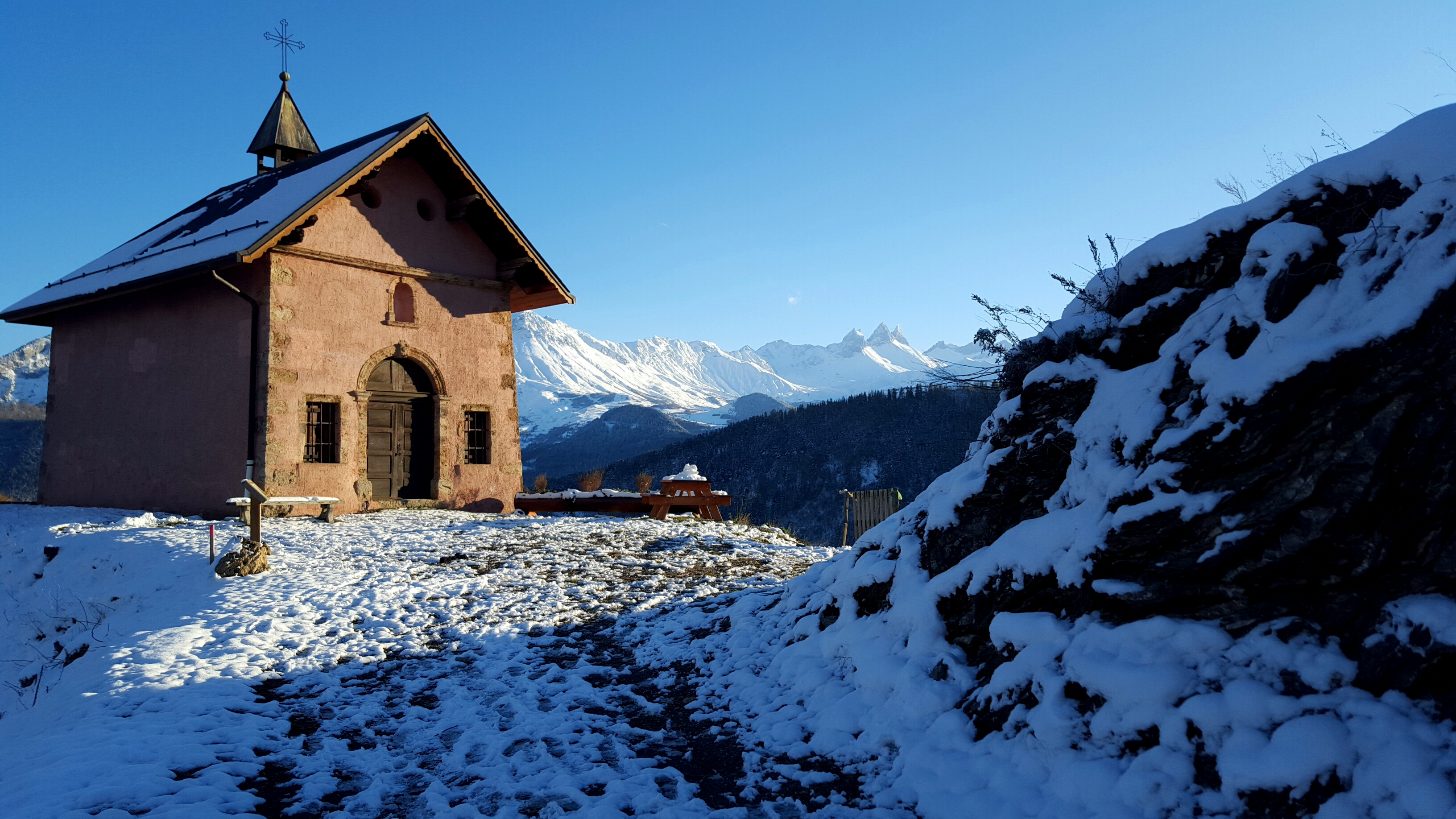 Chapelle St Roch, Jarrier (73), Novembre 2015